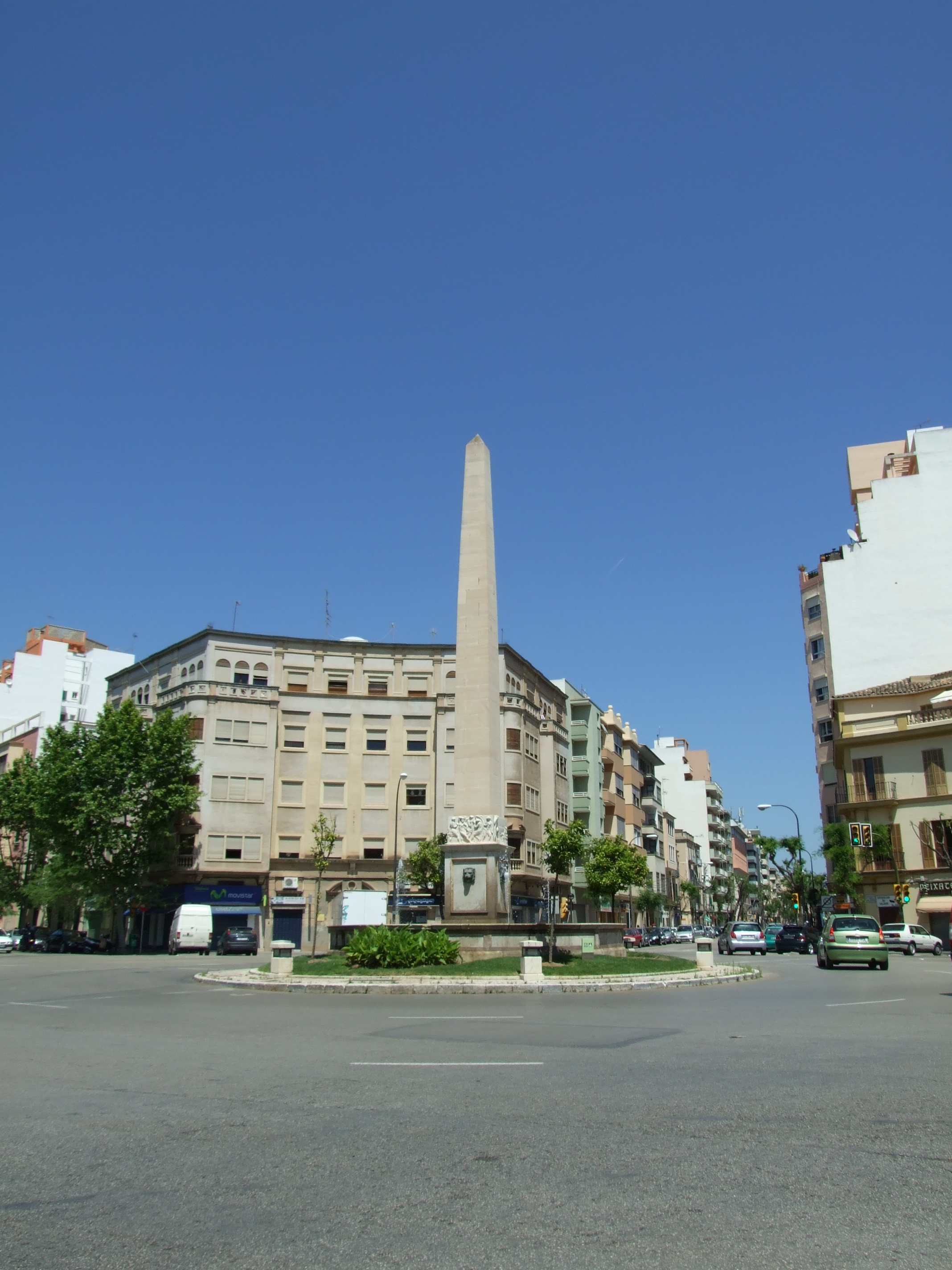 Plaça del cardenal Reig de Palma, Mallorca.